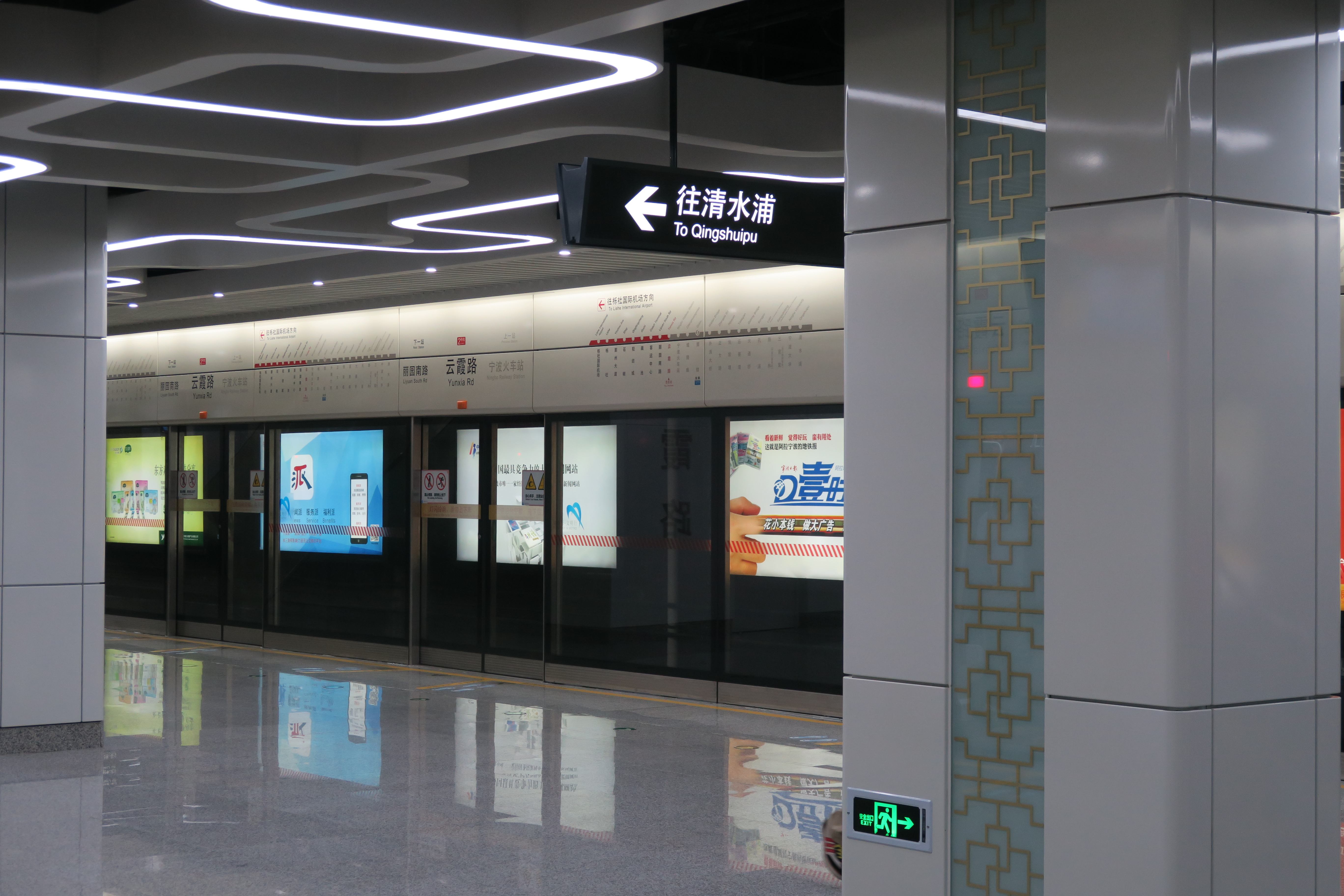 宁波地铁云霞路站